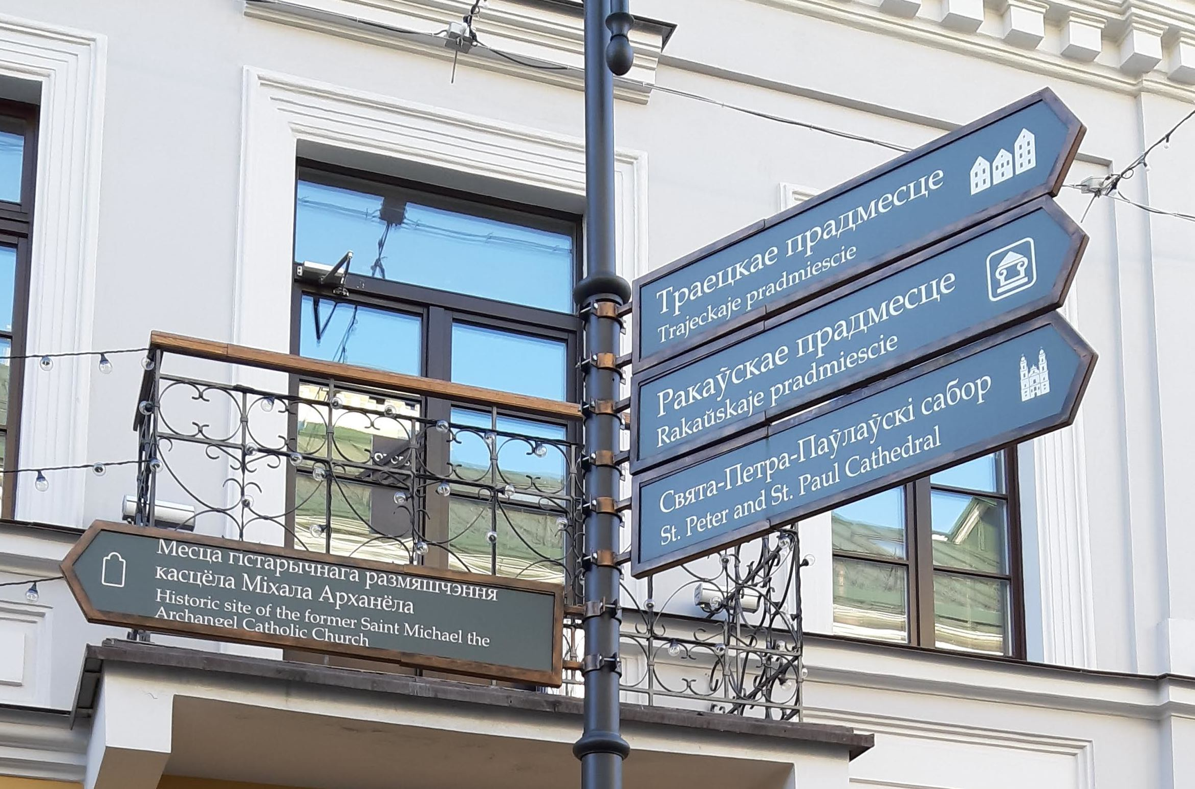 Мінск. Цэнтр у лютым 2019